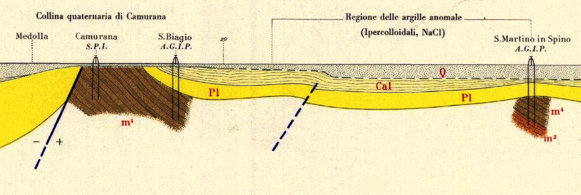 Collina quaternaria di Camurana - Regione delle argille anomale (Carta geologica d'Italia 1956)